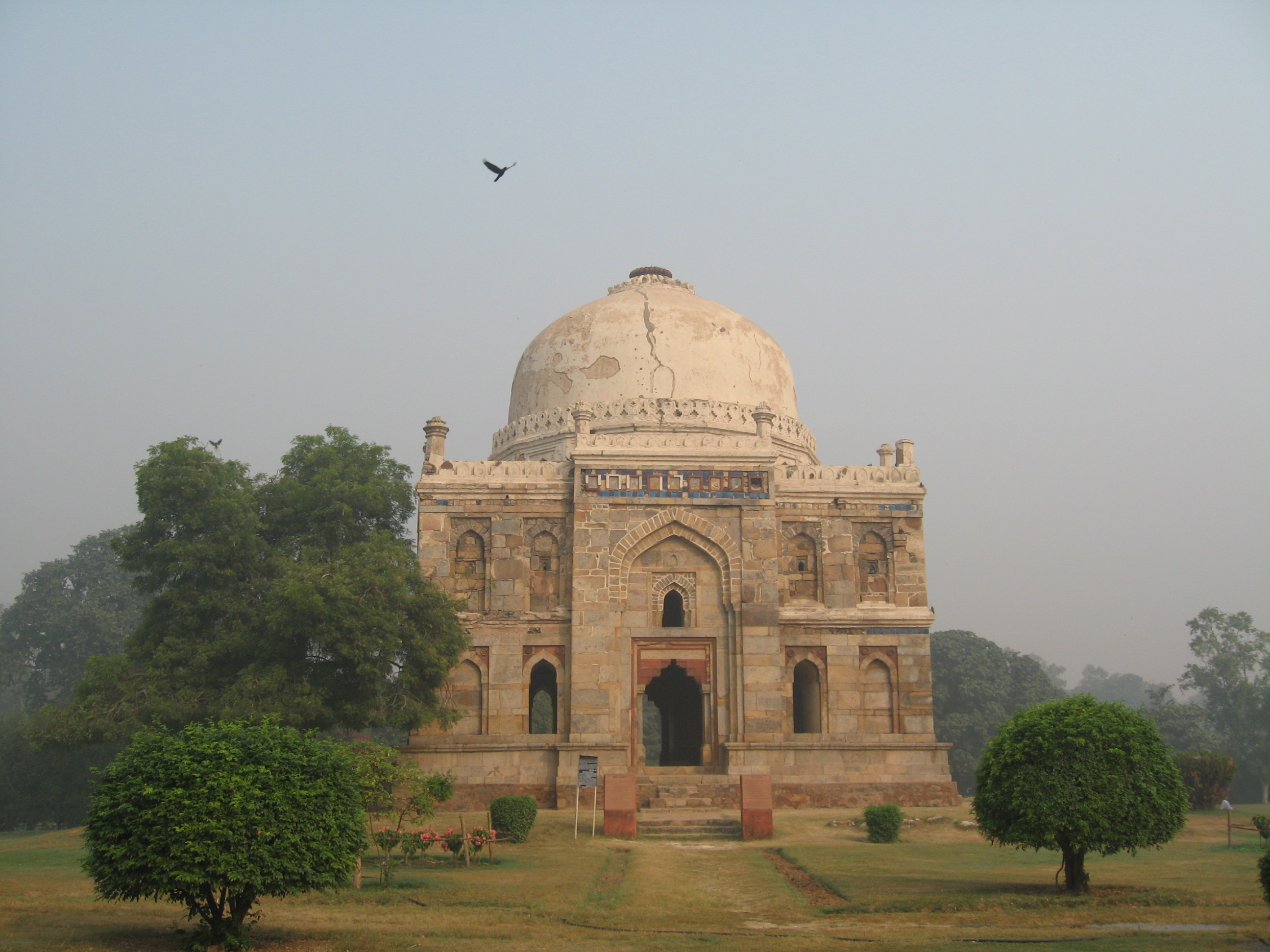 Sheesh Gumbad, Lodi Gardens, Delhi, India.